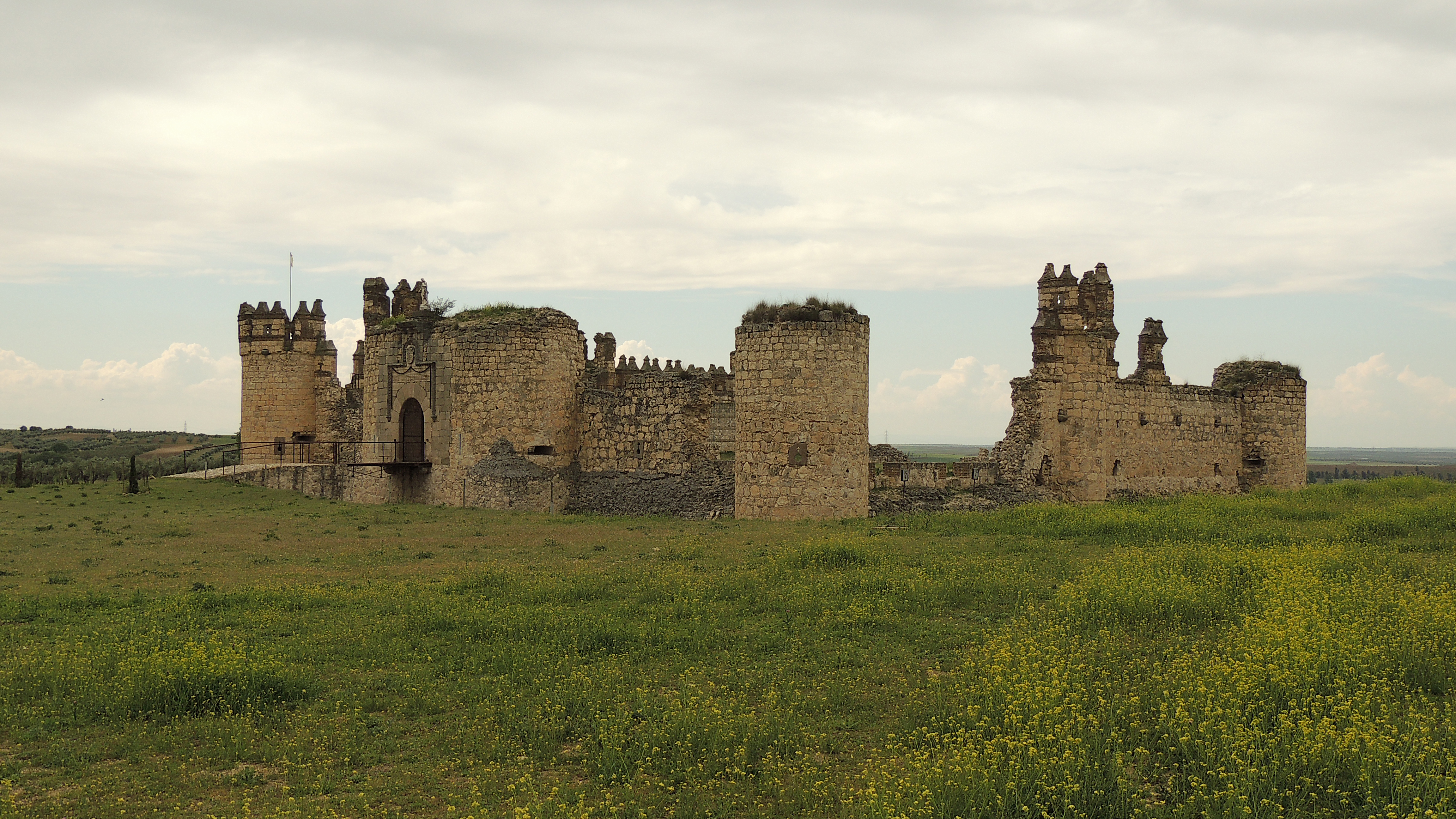 Vista del castillo de San Silvestre